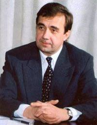 Бакіров Віль Савбанович — академік АН вищої школи України